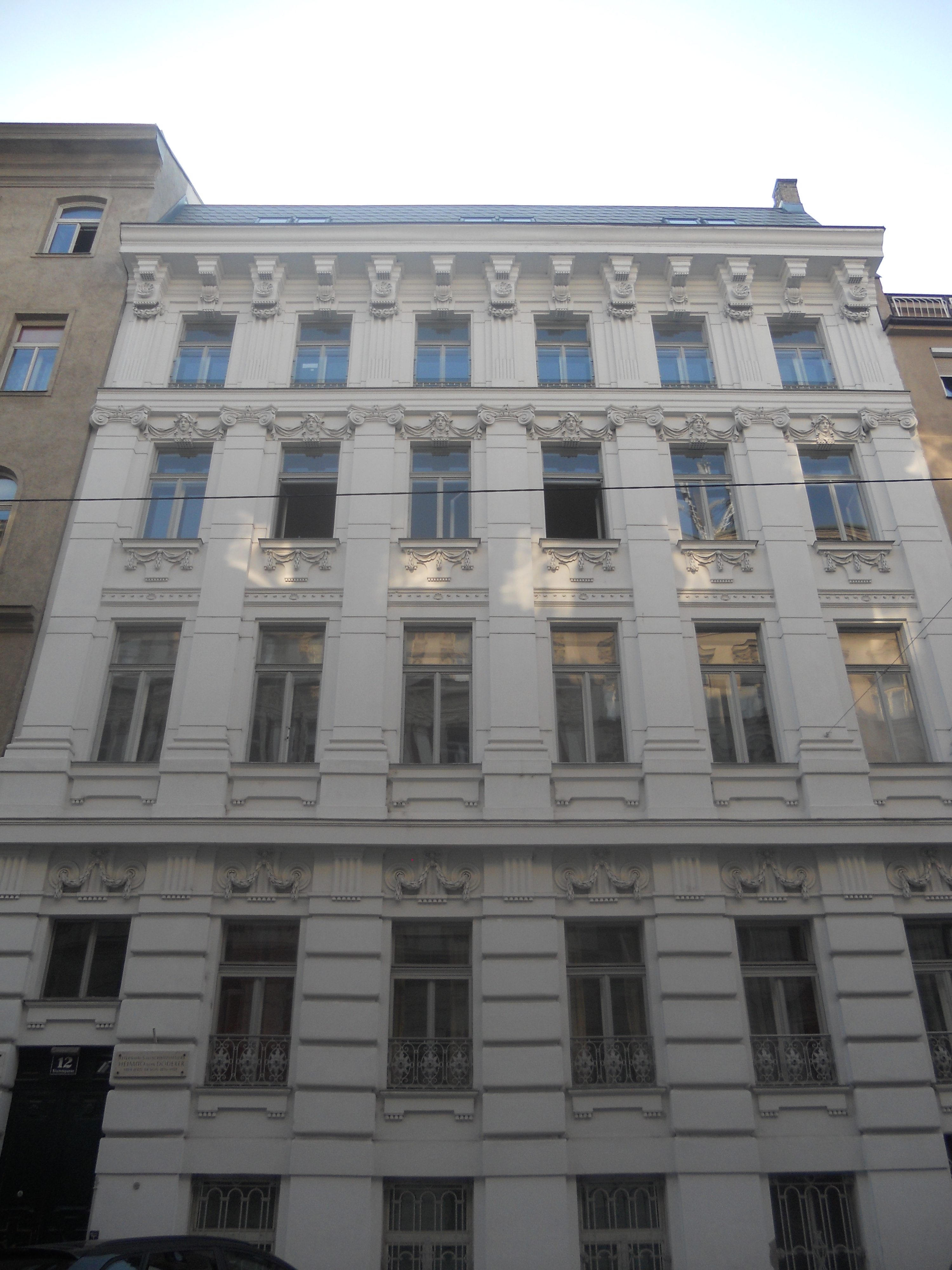 Haus Stammgasse 12 in Wien